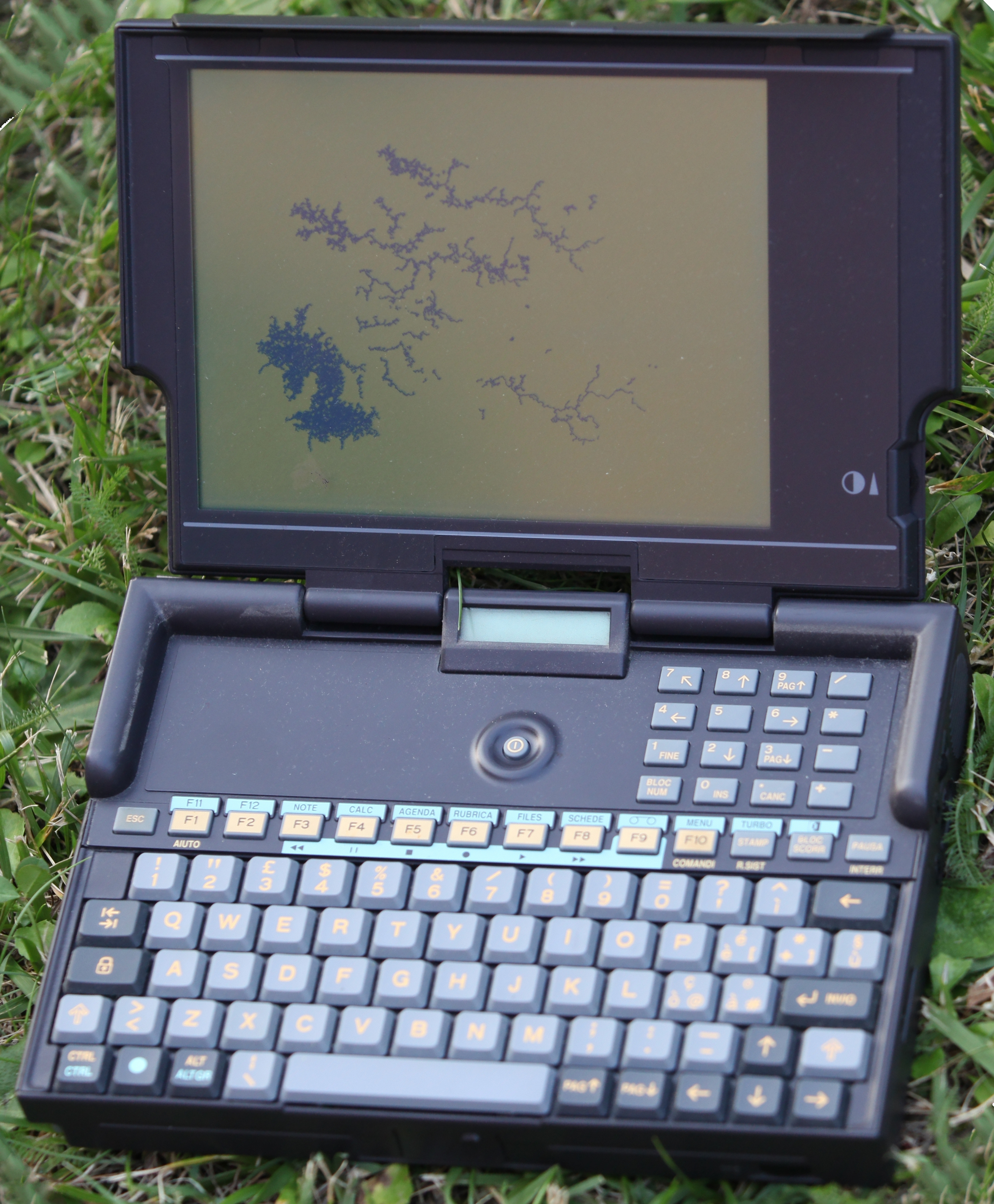 The Olivetti Quaderno computer